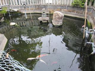 境内の鯉池